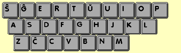 Klavarfasono por Esperanto Mankas la literoj Ĵ kaj Ĥ dekstre de la P.